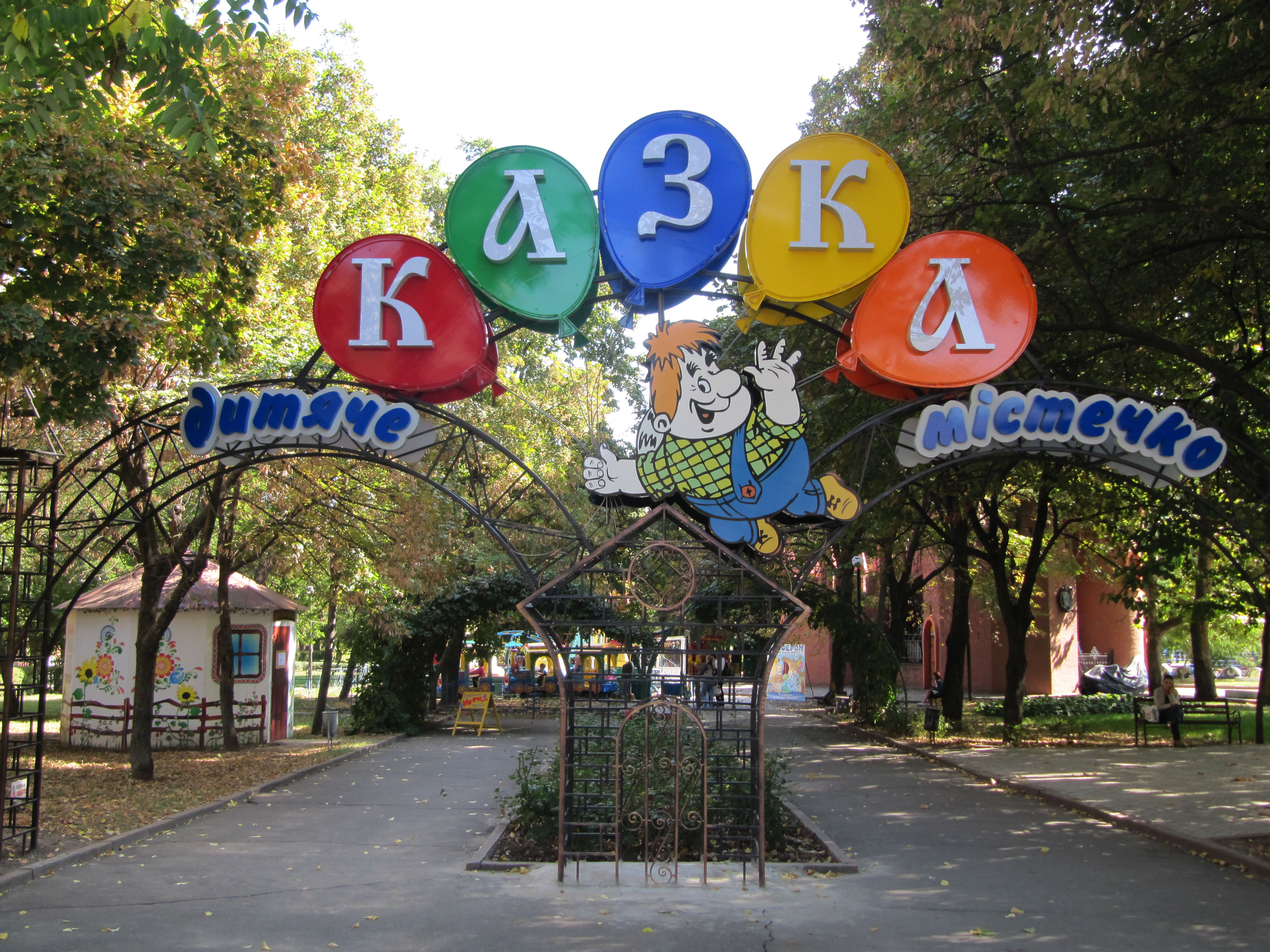 Дитяче містечко "Казка", м. Миколаїв Миколаївська весна у Вікіпедії